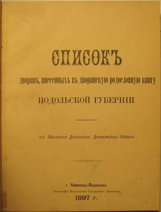 Список дворян Подільської губернії